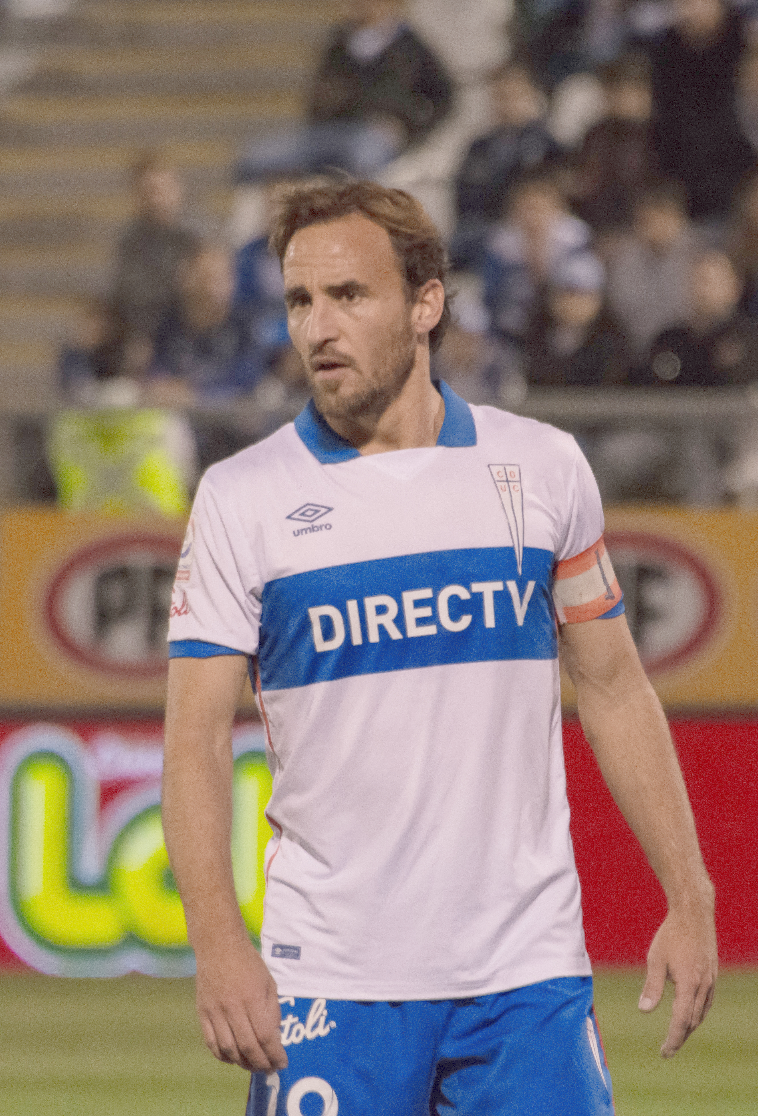 Universidad Católica v Huachipato, Estadio San Carlos de Apoquindo, Las Condes, Santiago, Chile.